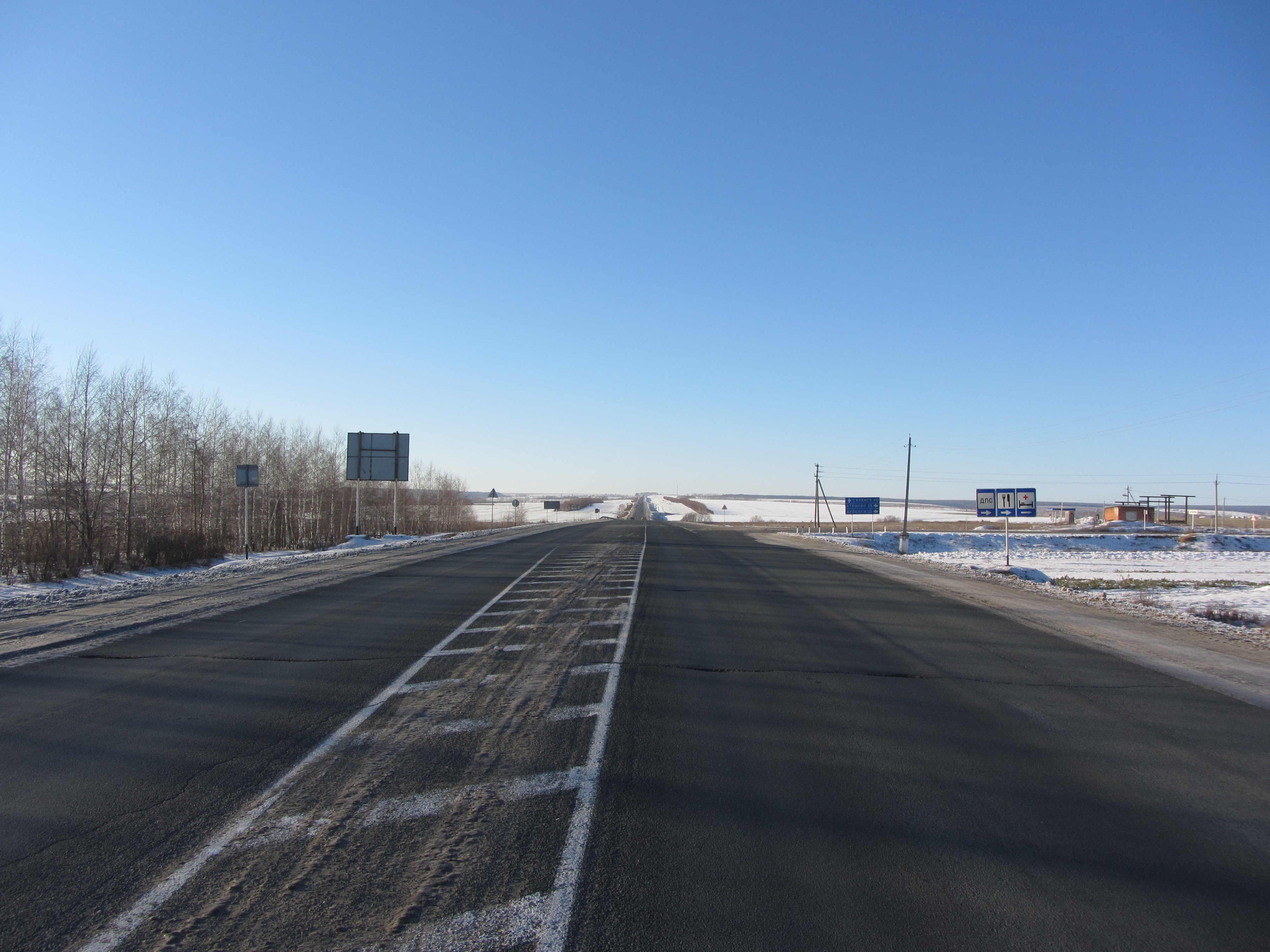 Трасса